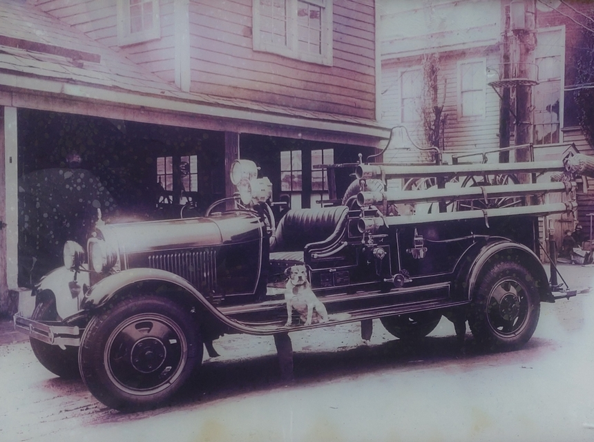 Bunkō (dog) and Fire engine